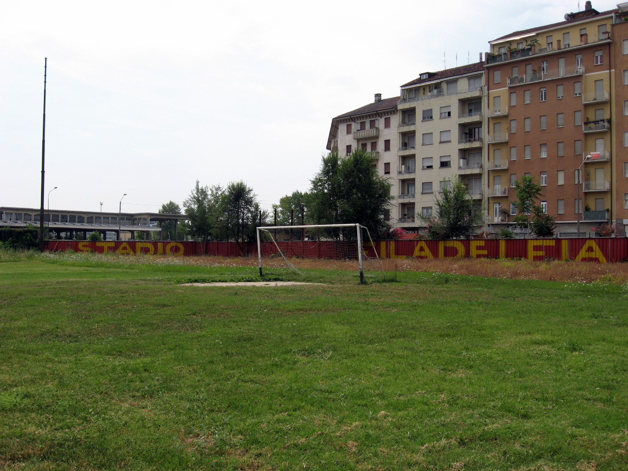 Old Filadelfia stadium in Turin